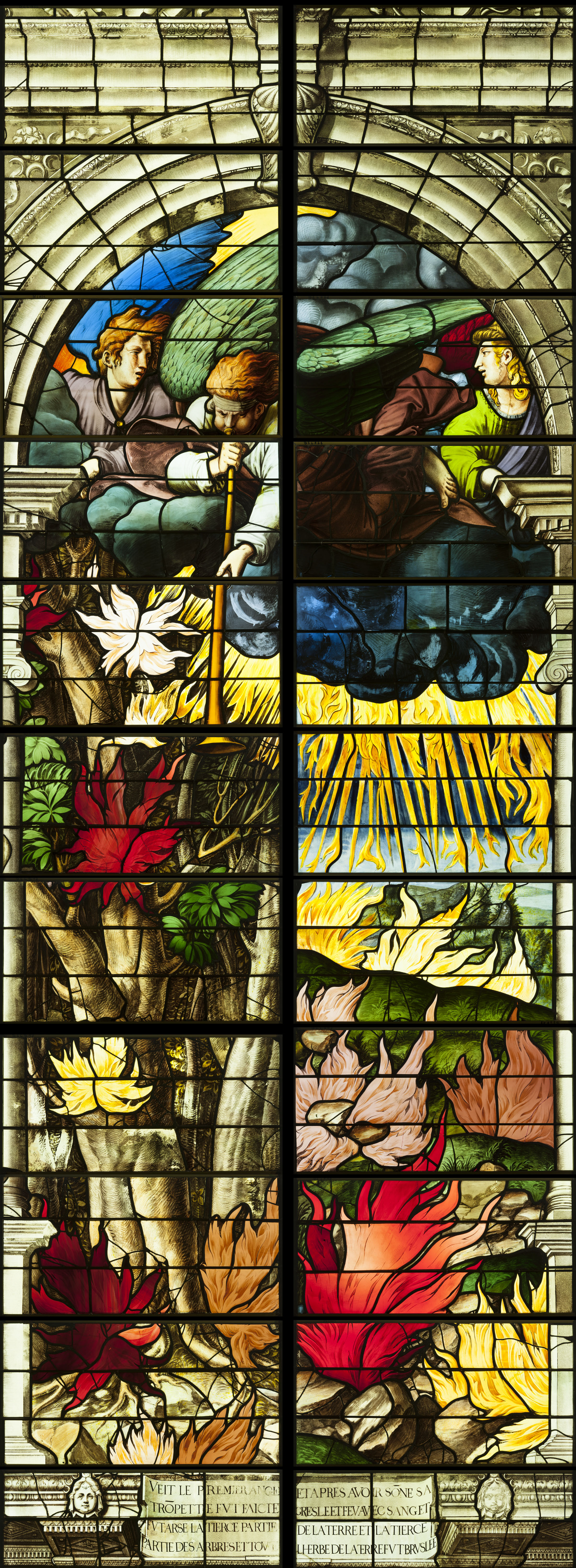 Montage présentant le registre supérieur de la baie 2 de l'abside.